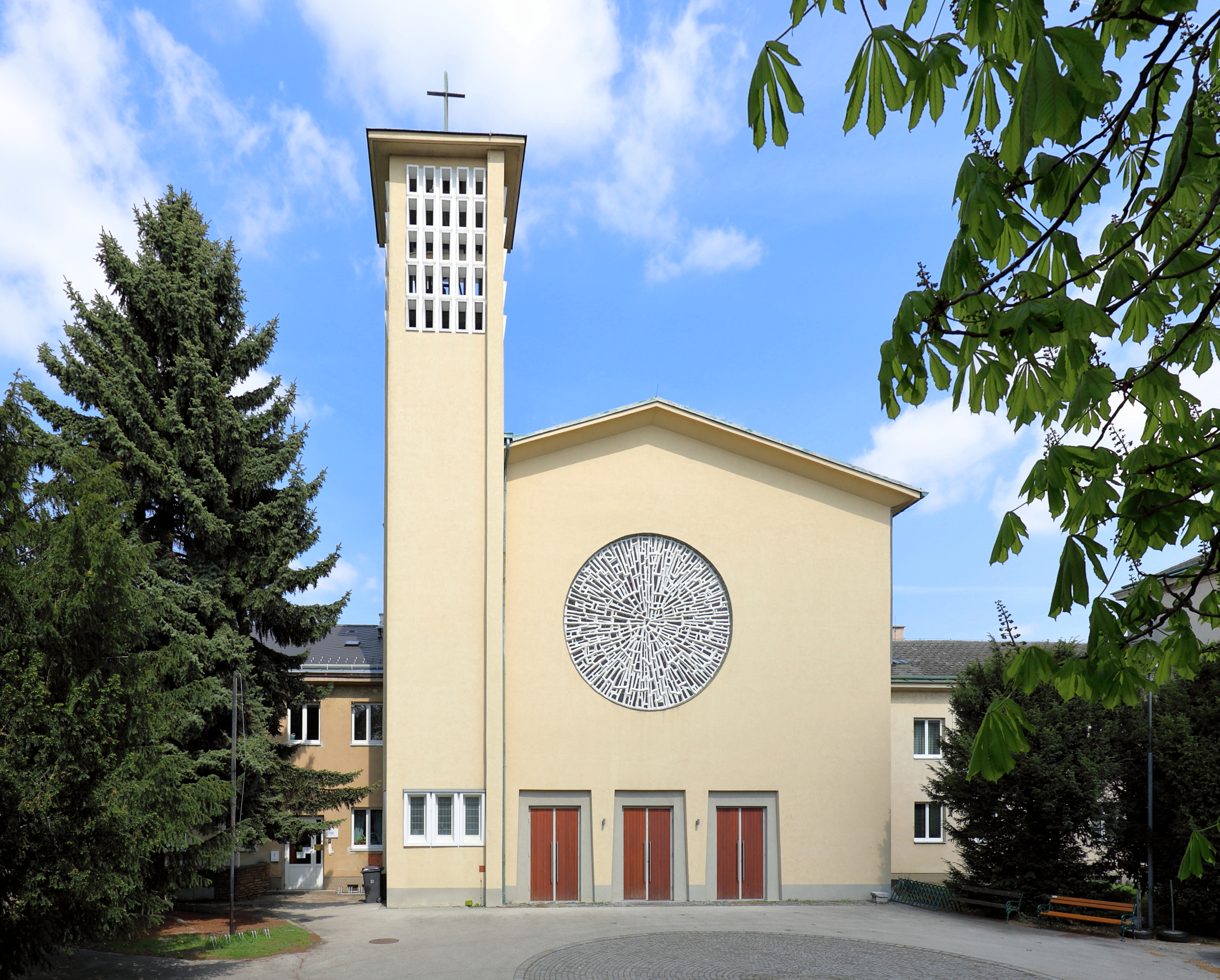 Die Hirschstettner Pfarrkirche im 22. Wiener Gemeindebezirk Donaustadt. Der schlichte Saalbau mit Giebel und seitlichem Glockenturm wurde von 1959 bis 1961 nach Plänen des Architekten Walter Prutscher auf dem Areal des im Zweiten Weltkrieg zerstörten Schlosses erbaut.